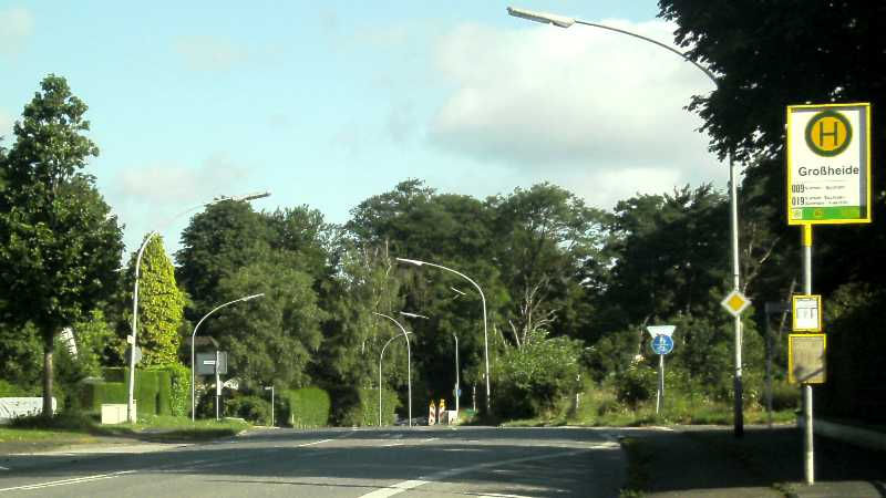 Bushaltestelle an der Viersener Straße in Mönchengladbach, Nordrhein-Westfalen, Deutschland